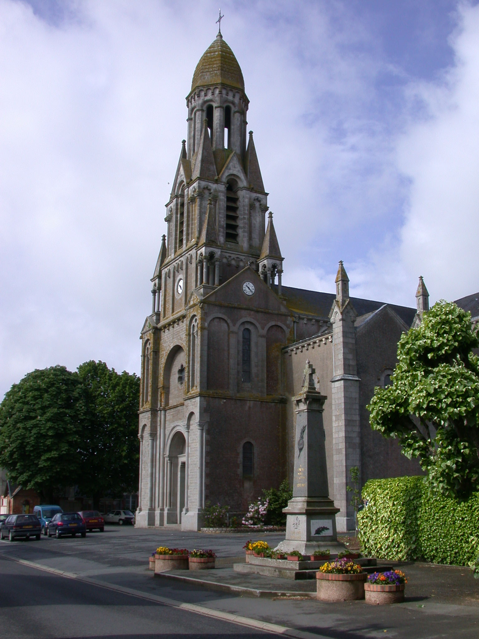 L'Eglise de la Tourlandry au centre du village.